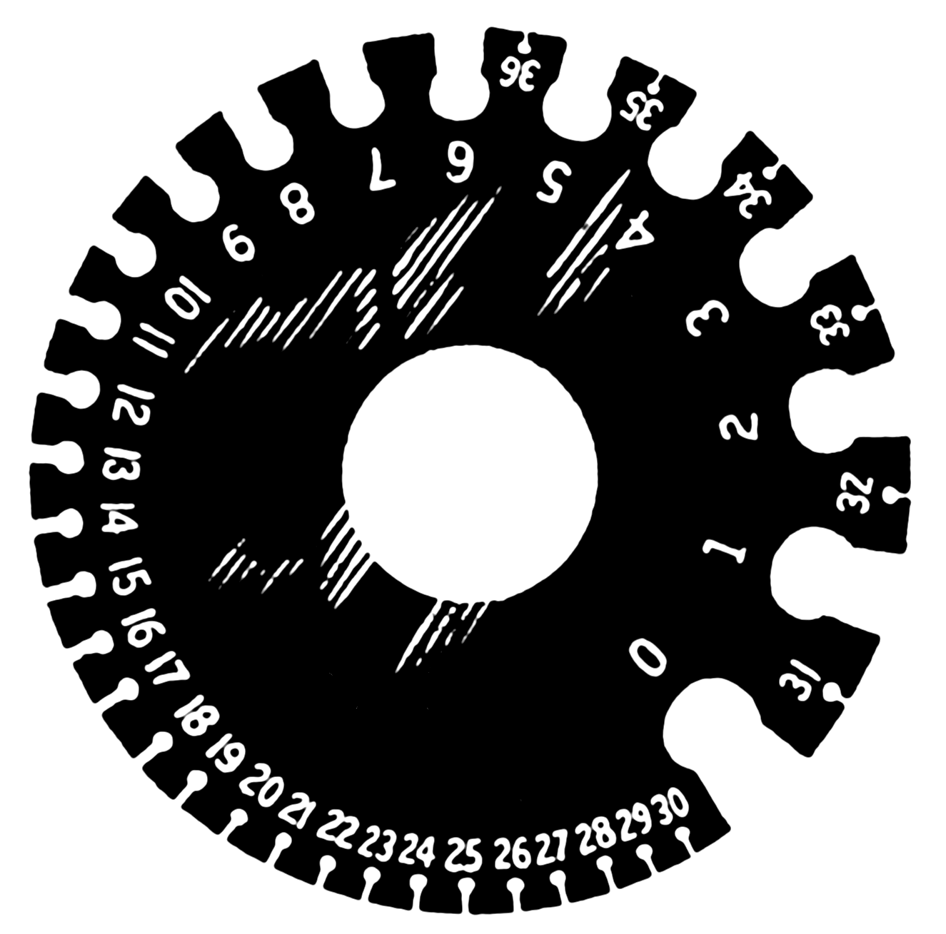 Wykasowano napis Standard Wire Gauge - nie jest to równoznaczne z AWG a tego dotyczy artykuł.